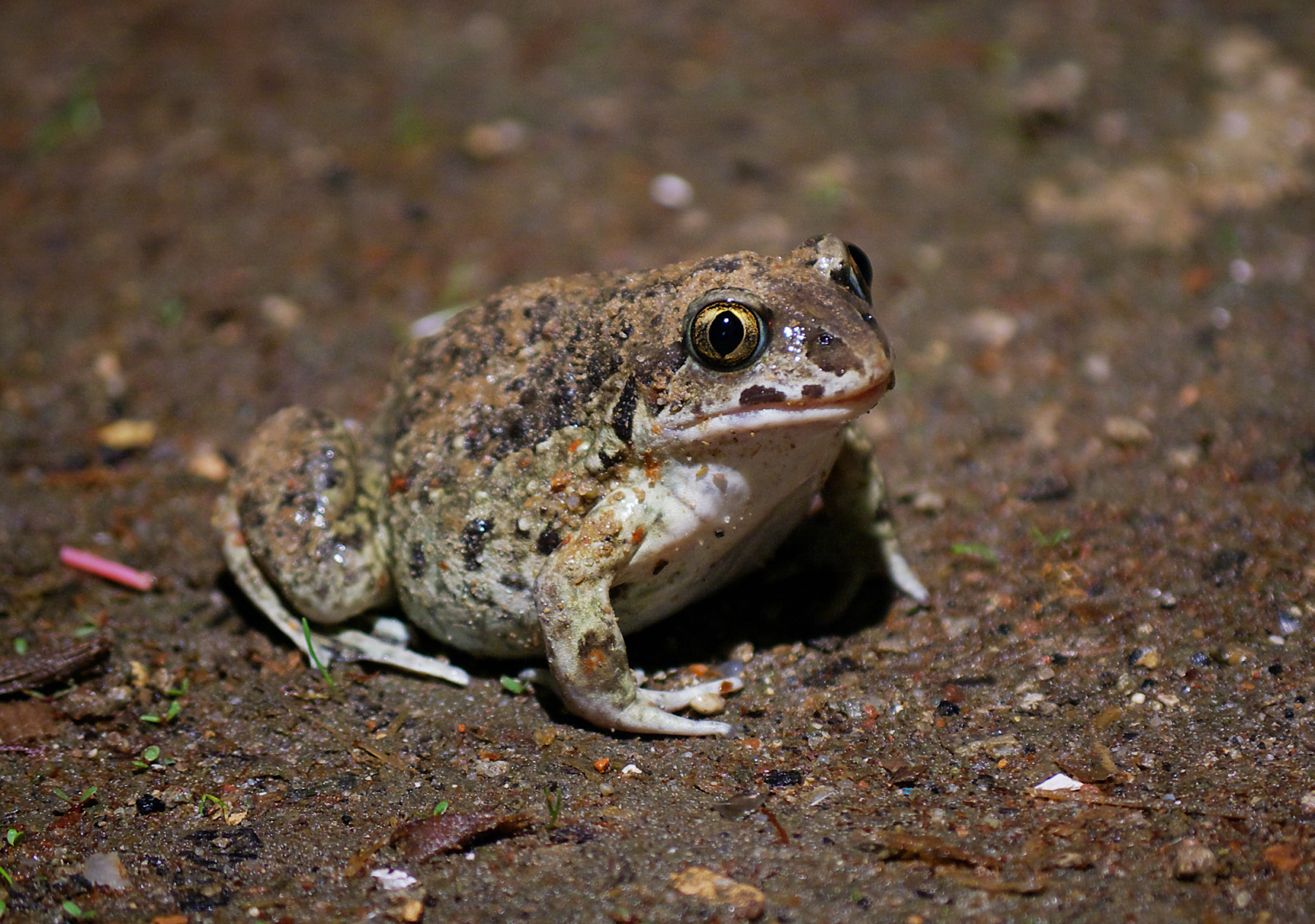 Knoblauchkröte (Pelobates fuscus), Männchen, gesehen in Datzow, Rügen